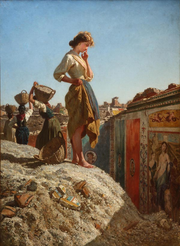 Fanciulla pensierosa agli scavi di Pompeilabel QS:Lit,"Fanciulla pensierosa agli scavi di Pompei"